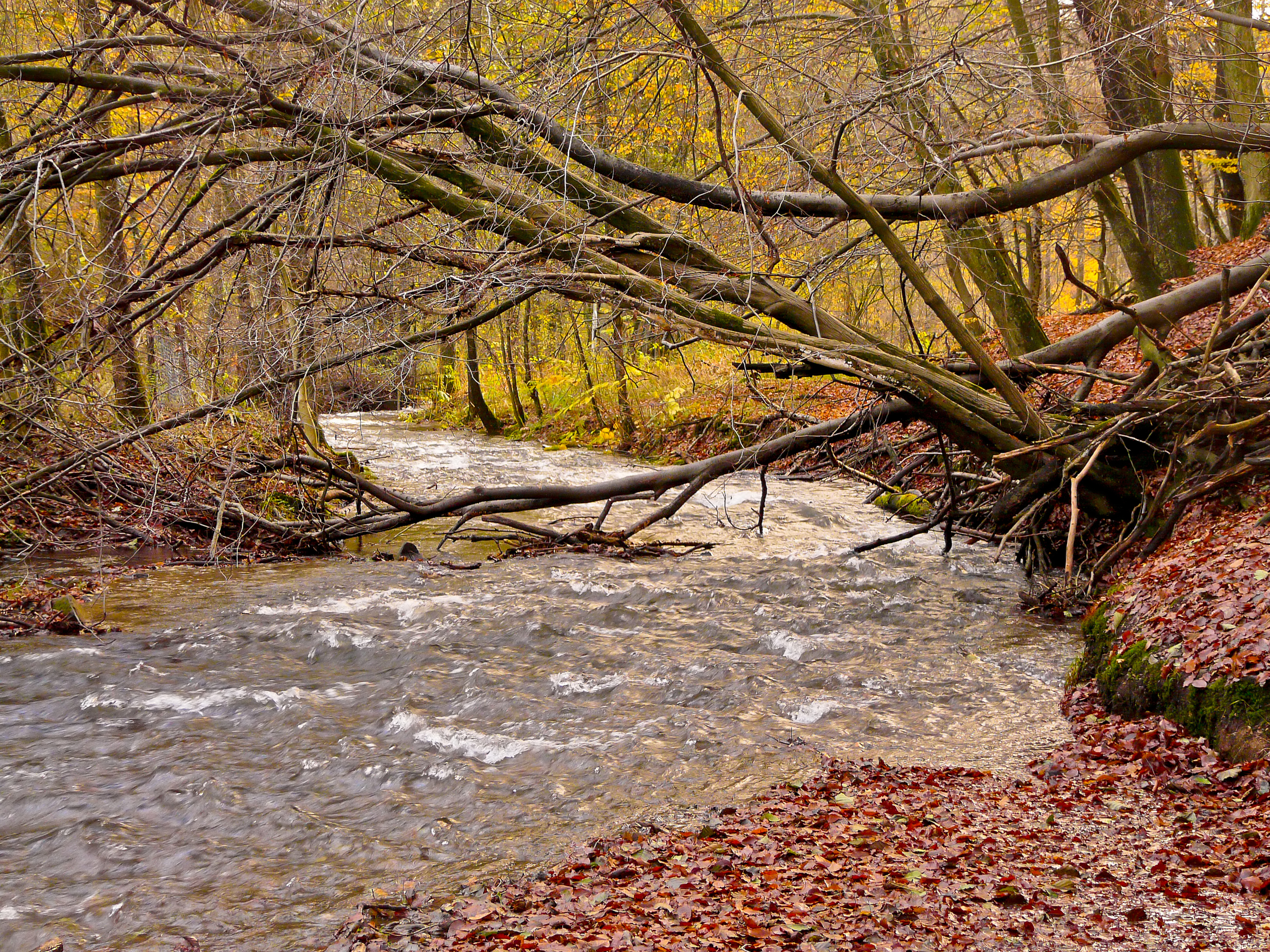 NSG W-015 Fliessgewässsersystem Gelpe- und Saalbachtal: Gelpebach ca. 600 m oberhalb von Steffenshammer